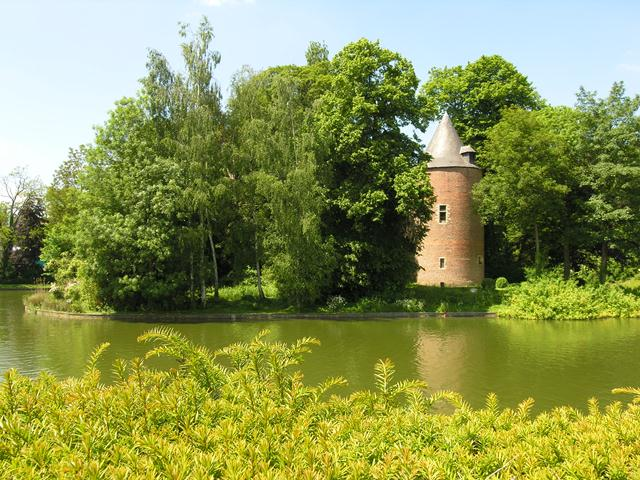 Dilbeek Gemeenteplein Sint-Alenatoren